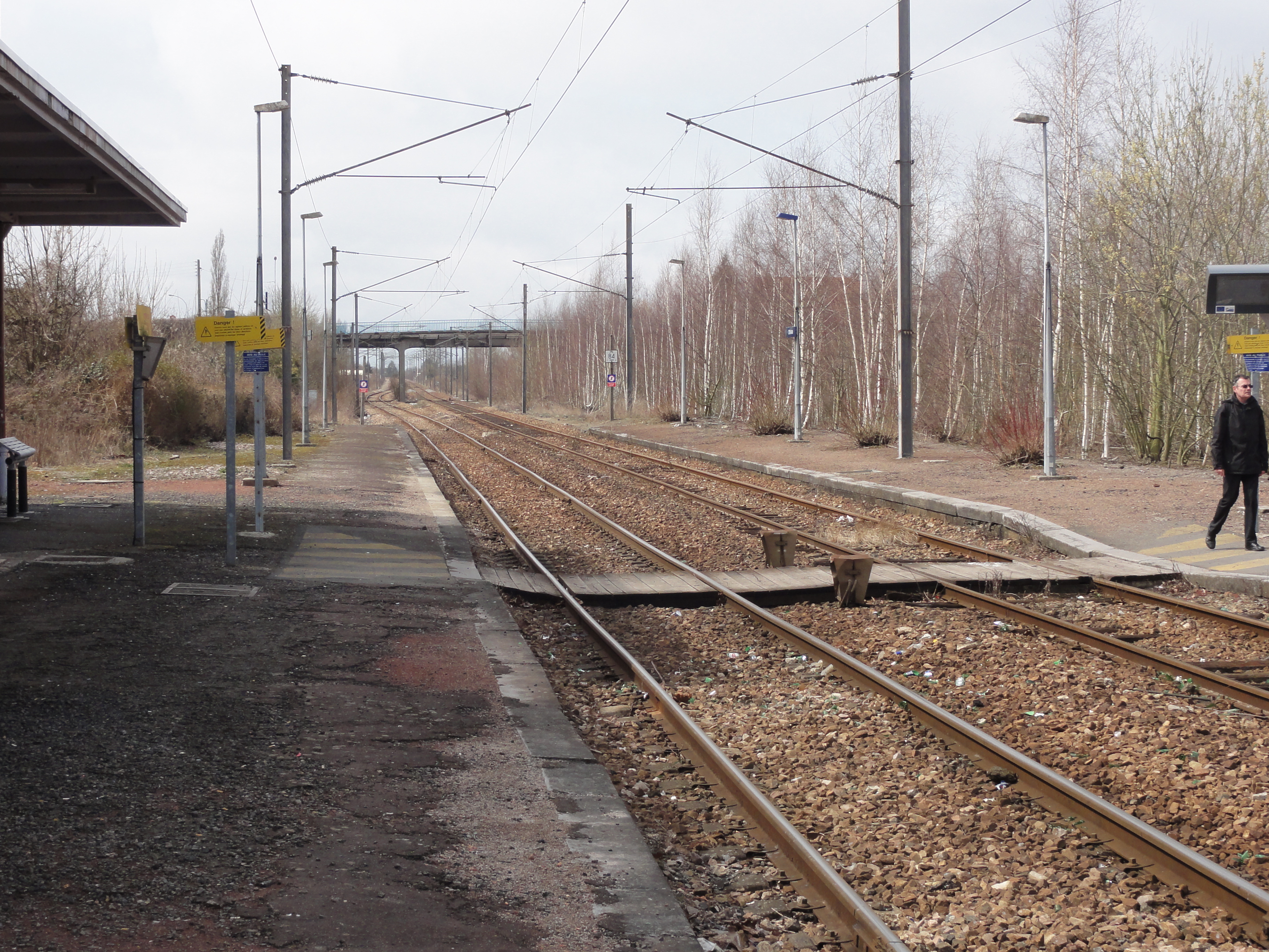 Gare de Denain, Nord, Nord-Pas-de-Calais, France.